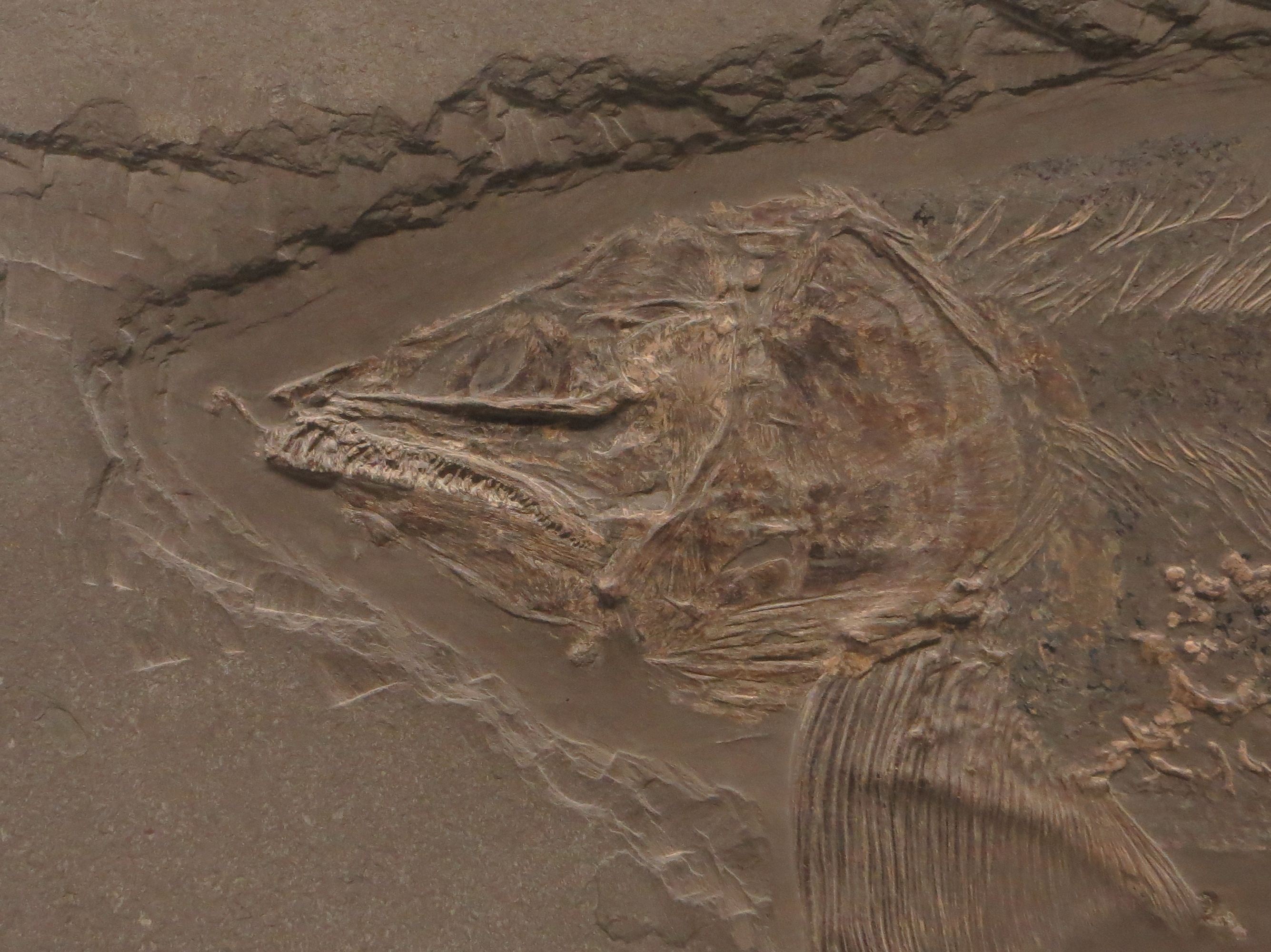 Fossil of Saurostomus- Took the picture at Museum am Lowentor, Stuttgart